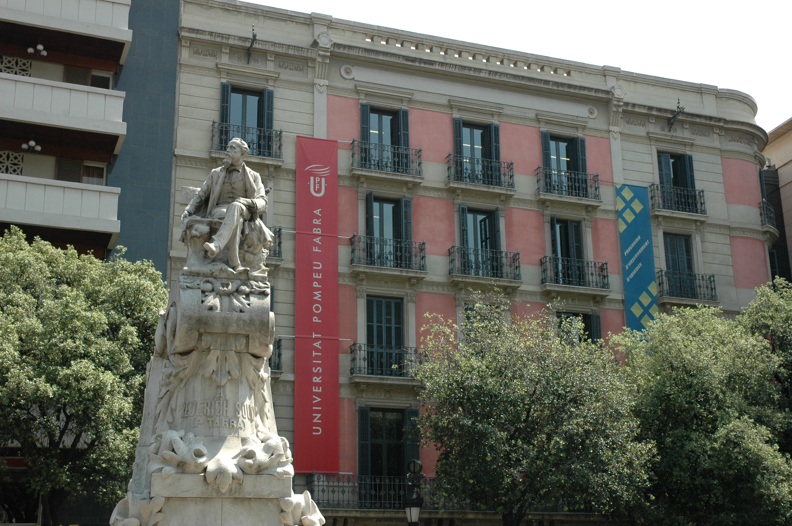 Serafí Pitarra i UPF al fons